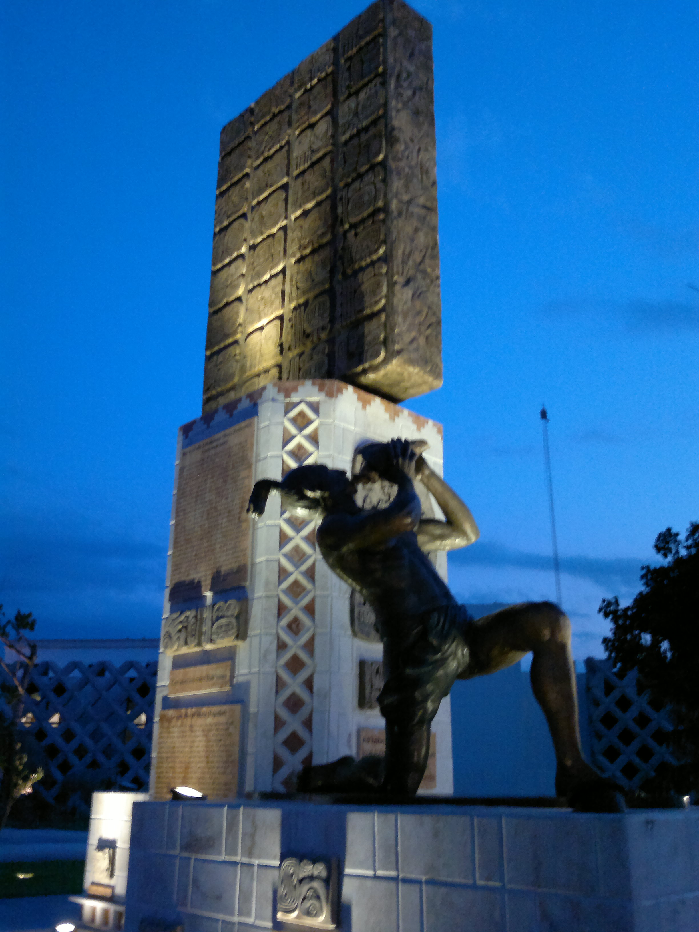 Imagen de la estatua de un maya, al anochecer, en el Gran Museo del Mundo Maya de Mérida.